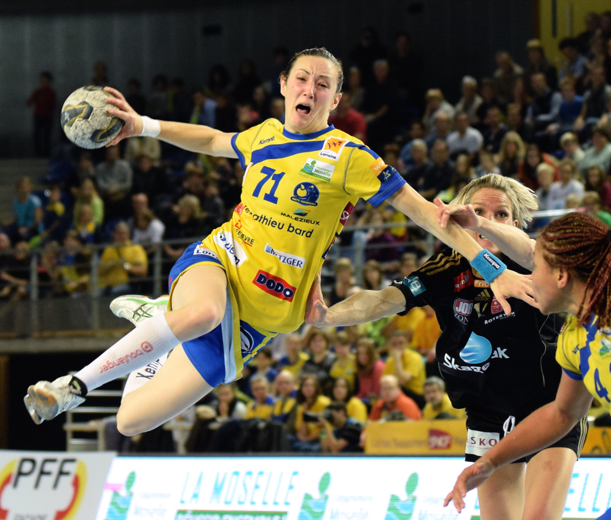 Kristina Liščević , le 15 novembre 2014 lors du match de Ligue des champions Metz / Larvik.